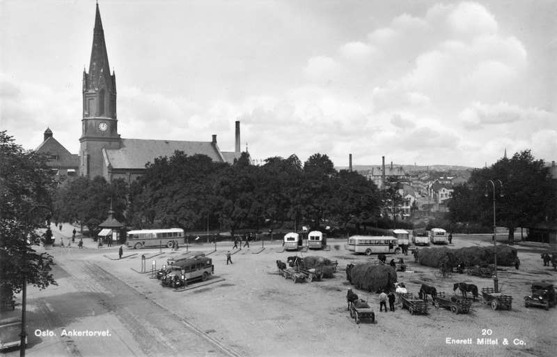 Oslo. Ankertorvet. Motiv: torg, busser, hester, vogner, høylass, Jakob kirke